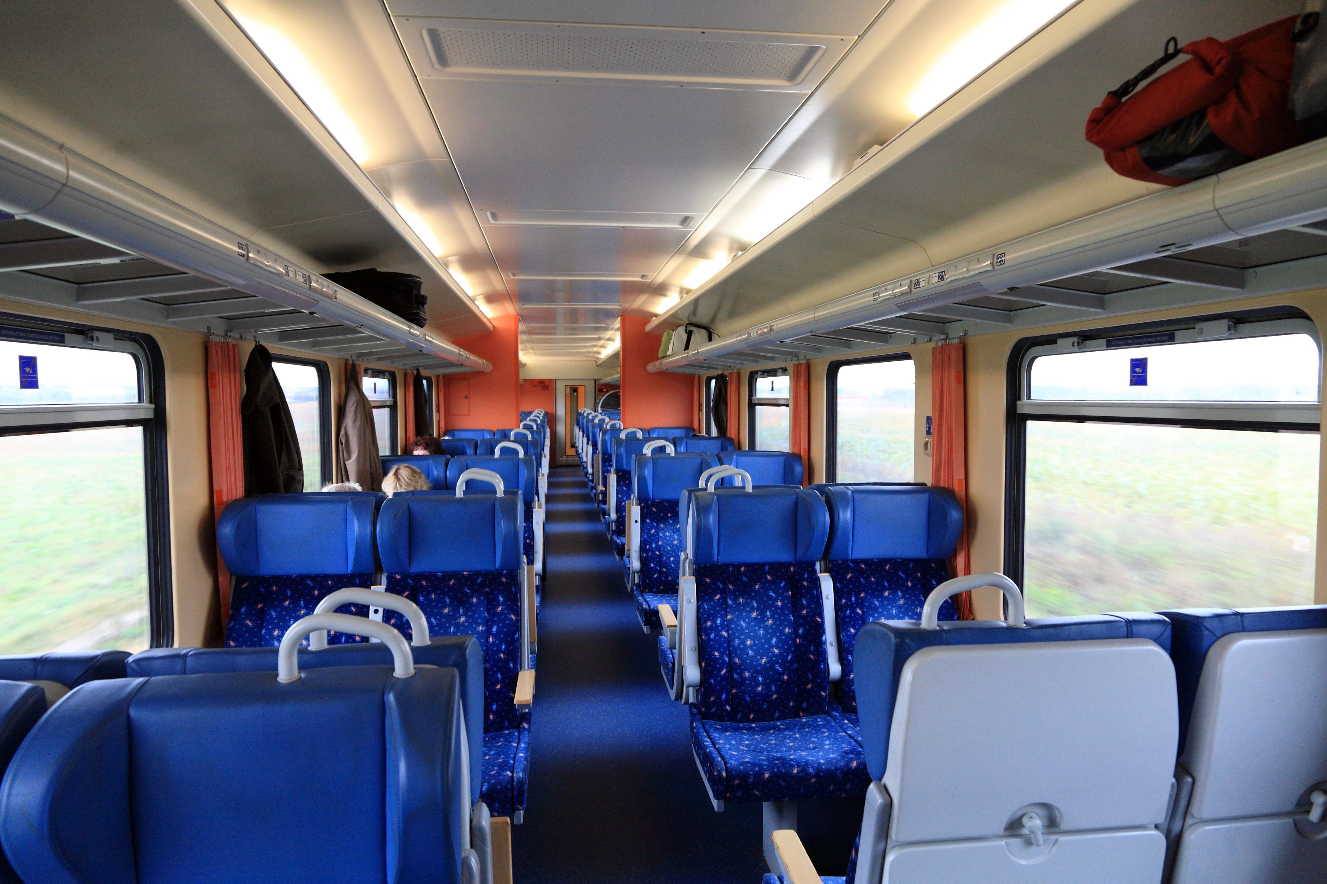 Innenraum eines Großraumwagens zweiter Klasse für den Schnellzugdienst